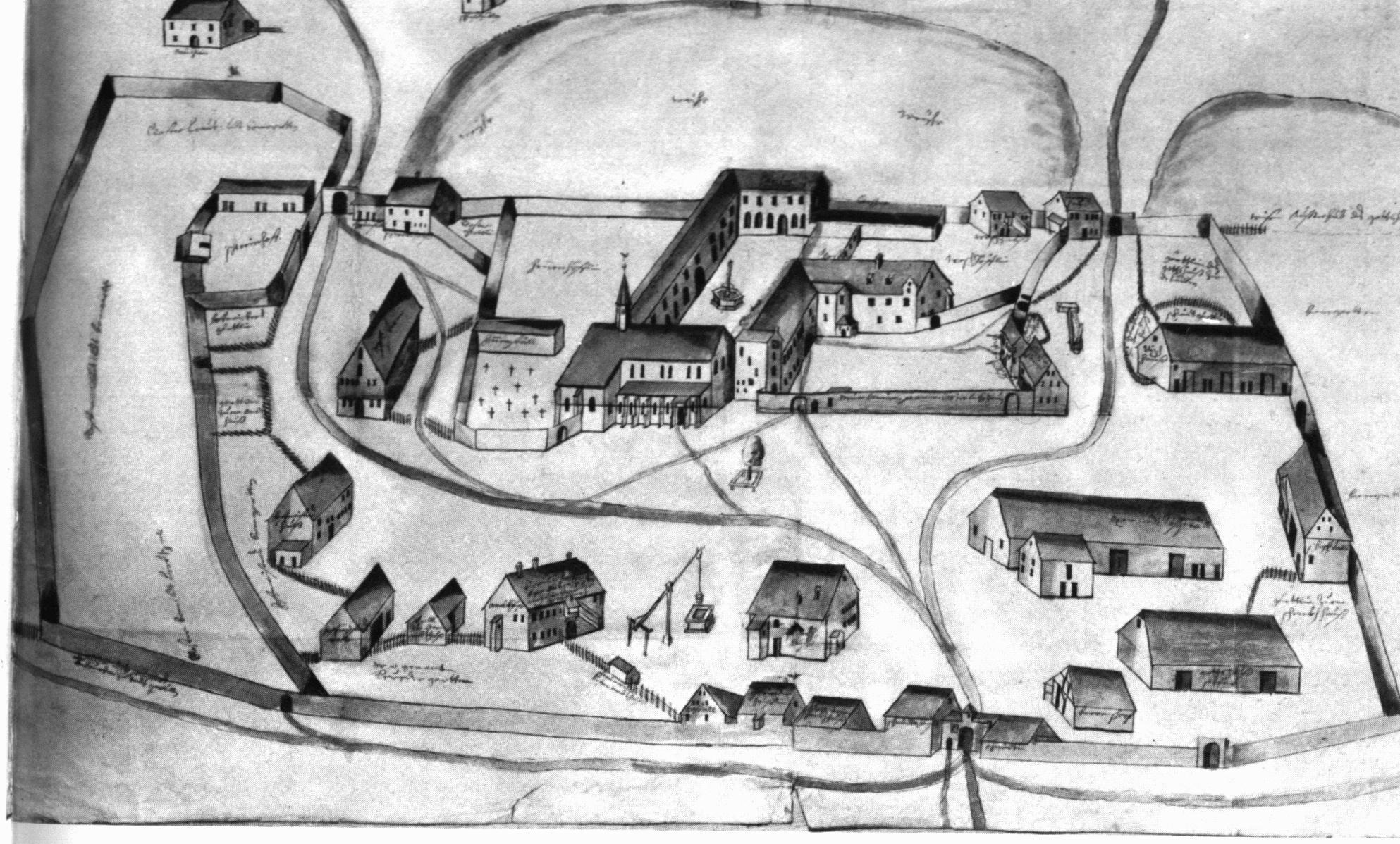 Kloster Wald vor der barocken Umgestaltung. Aquarellierte Federzeichnung, um 1685. Fürstlich Hohenzollernsches Haus- und Domänenarchiv Sigmaringen.